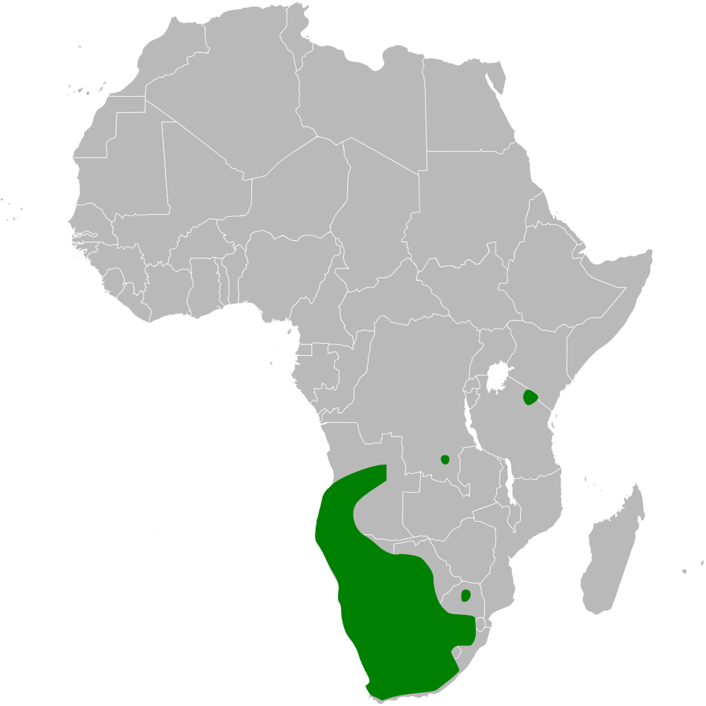 Chersomanes distribution map, based on